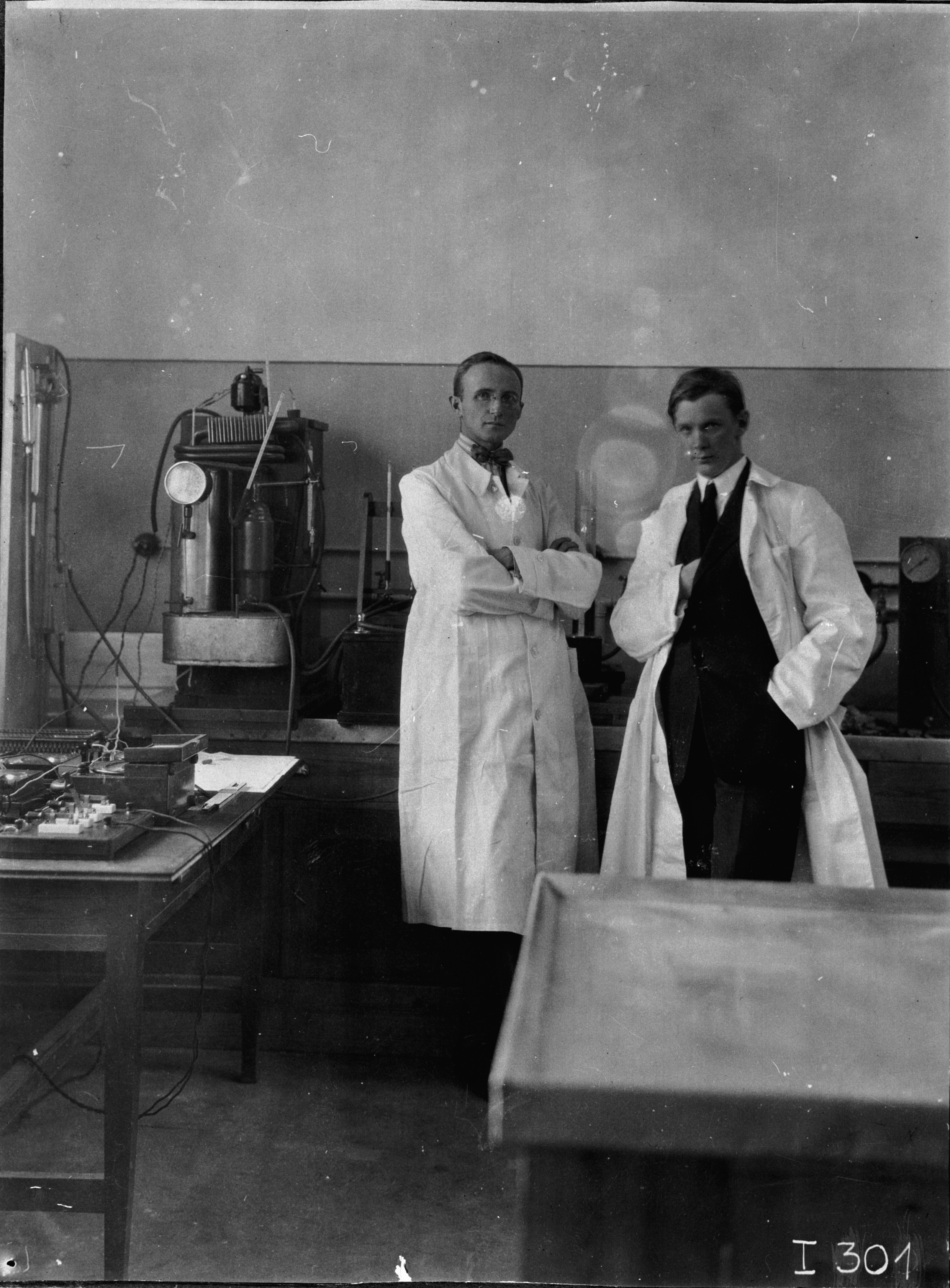 Elektroluxlaboratoriet. Ingenjör B. von Platen och C. Munters.